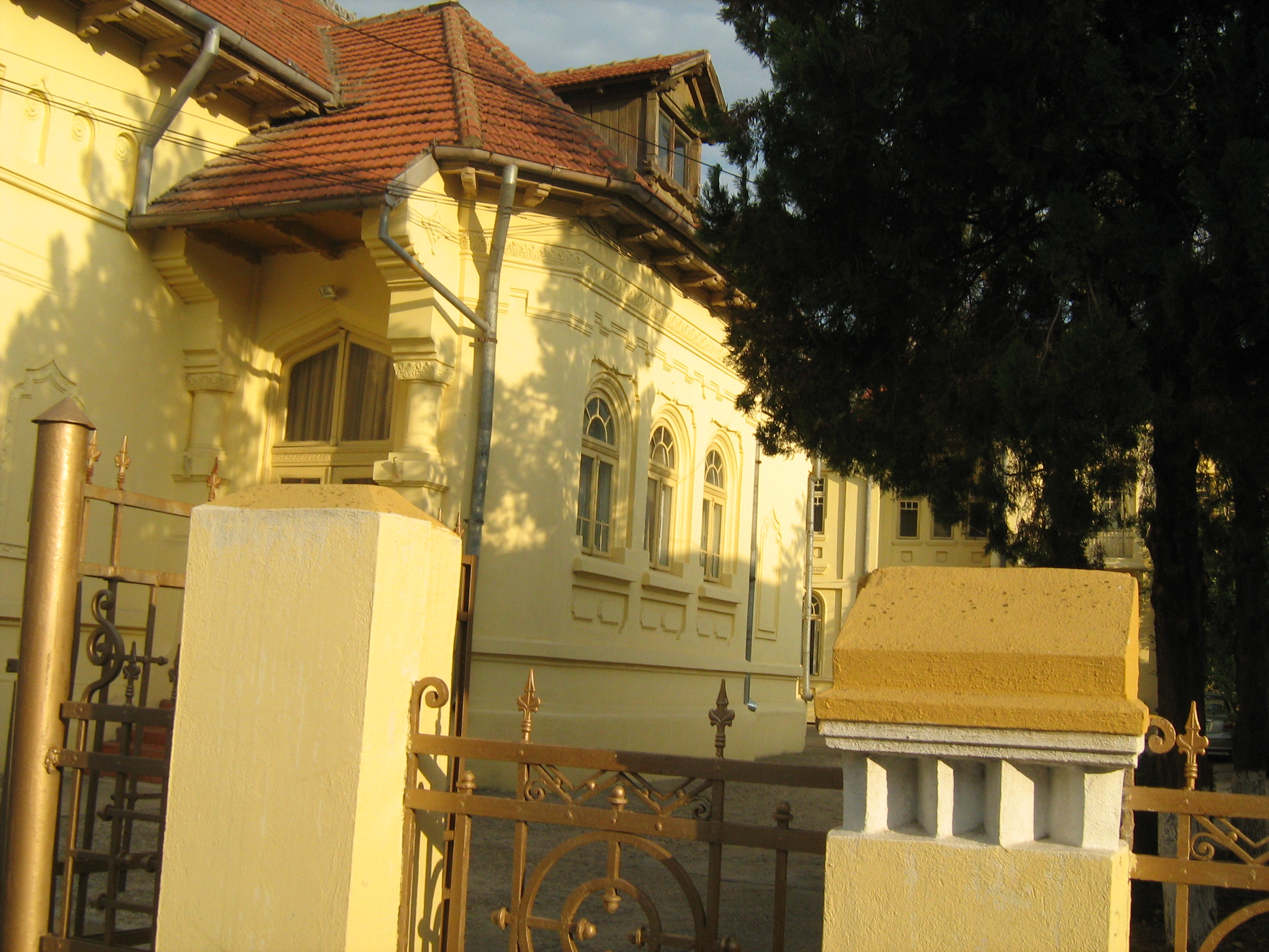 Casa Armatei Galati